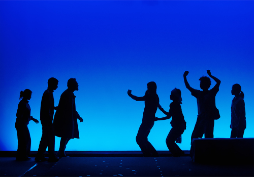 『靴の中の小石』より～2012年7月武蔵野芸能劇場